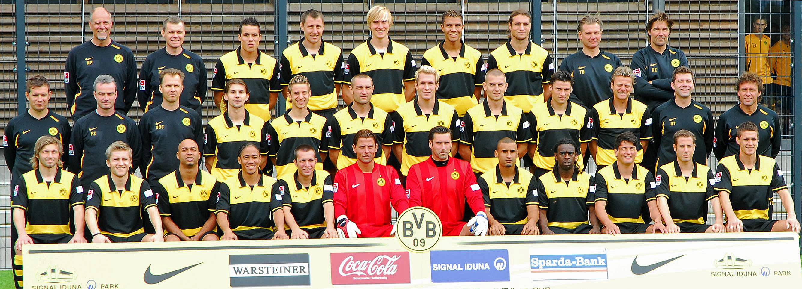 Borussia Dortmund bei der offiziellen Mannschaftsvorstellung für die Saison 2007/08